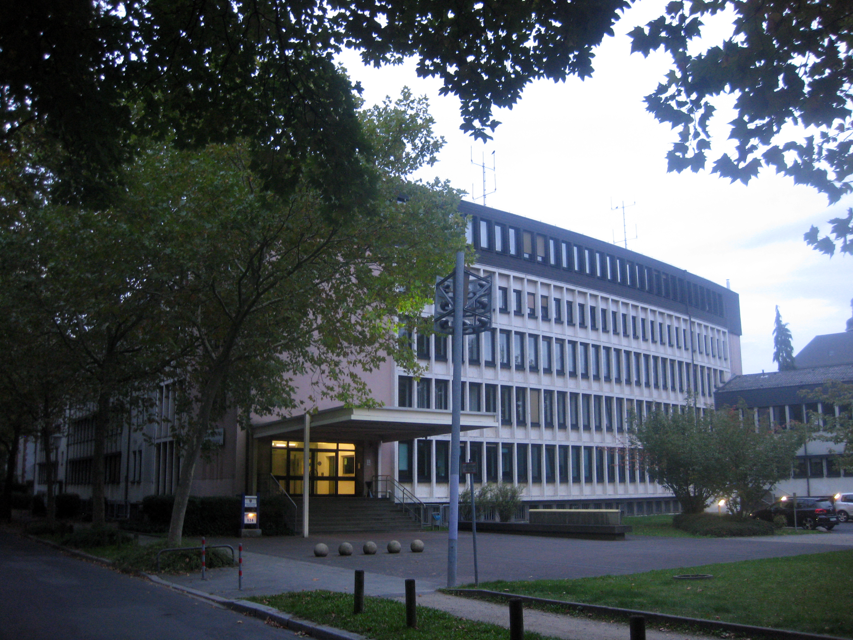 Ehemaliges Kreishaus des Landkreises Offenbach (bis 1977). Seitdem nach Renovierung Sitz des Polizeipräsidiums Südosthessen